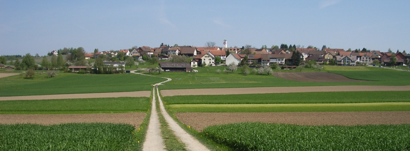 Truttikon ZH, Switzerland